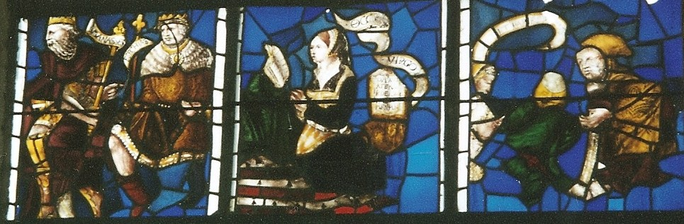 Vitrail de la Chapelle de Gausson